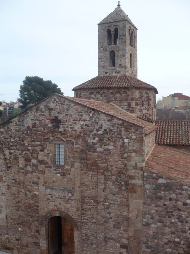 Església de Santa Maria de Terrassa.Pertany a l'art visigòtic.